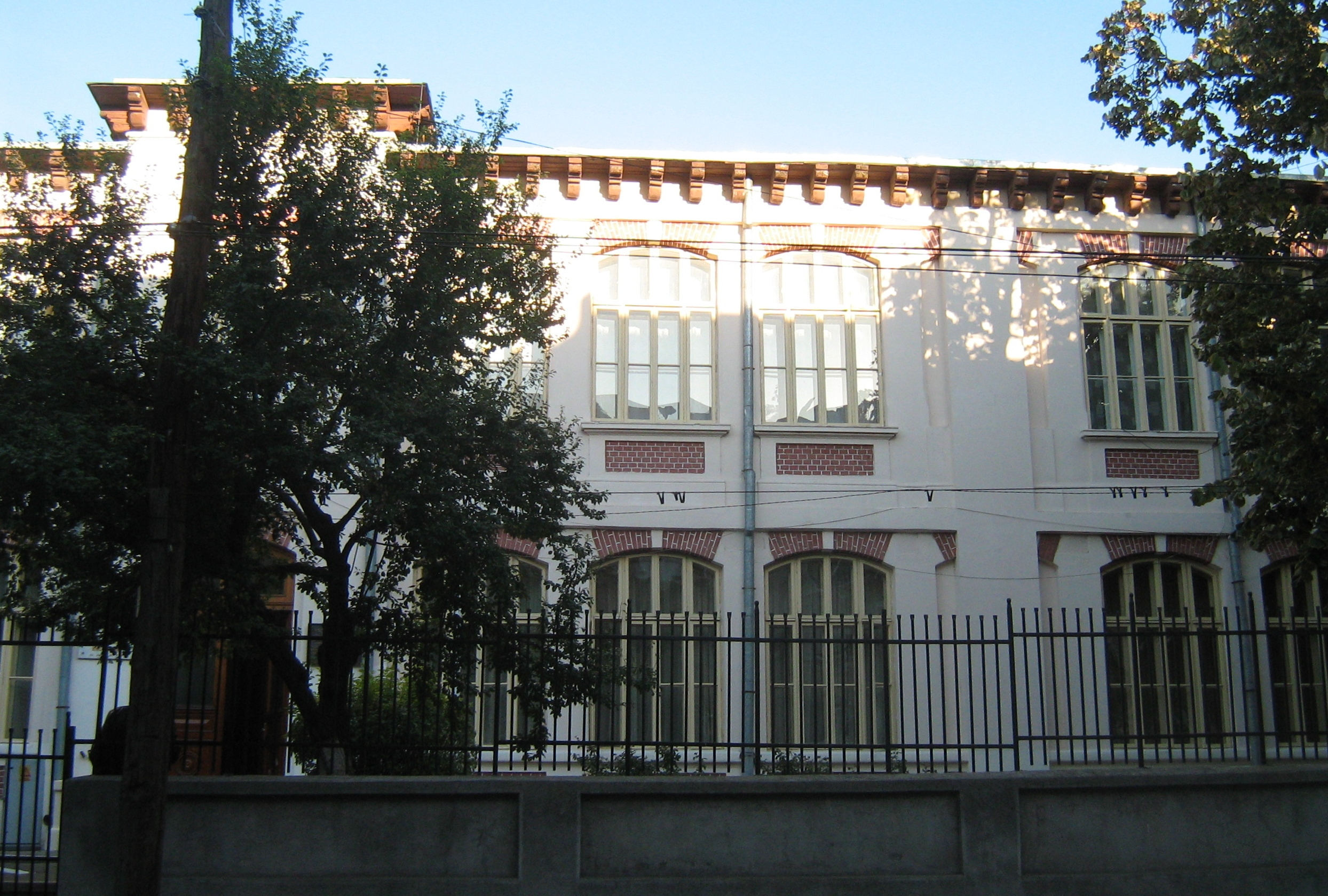 Școala tip „Spiru Haret”